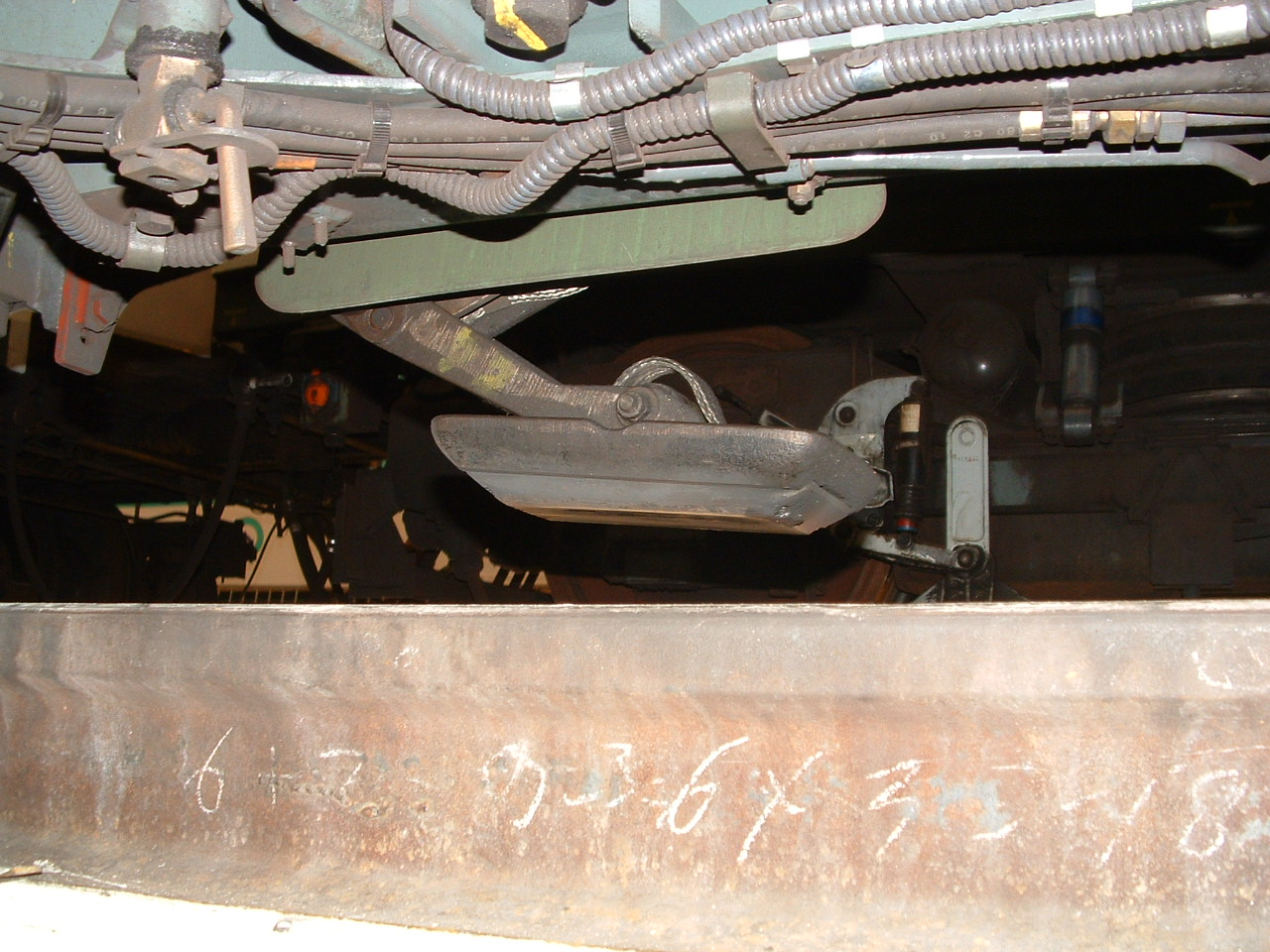 Frotteur électrique d'un MF 77 vu du dessous du train.